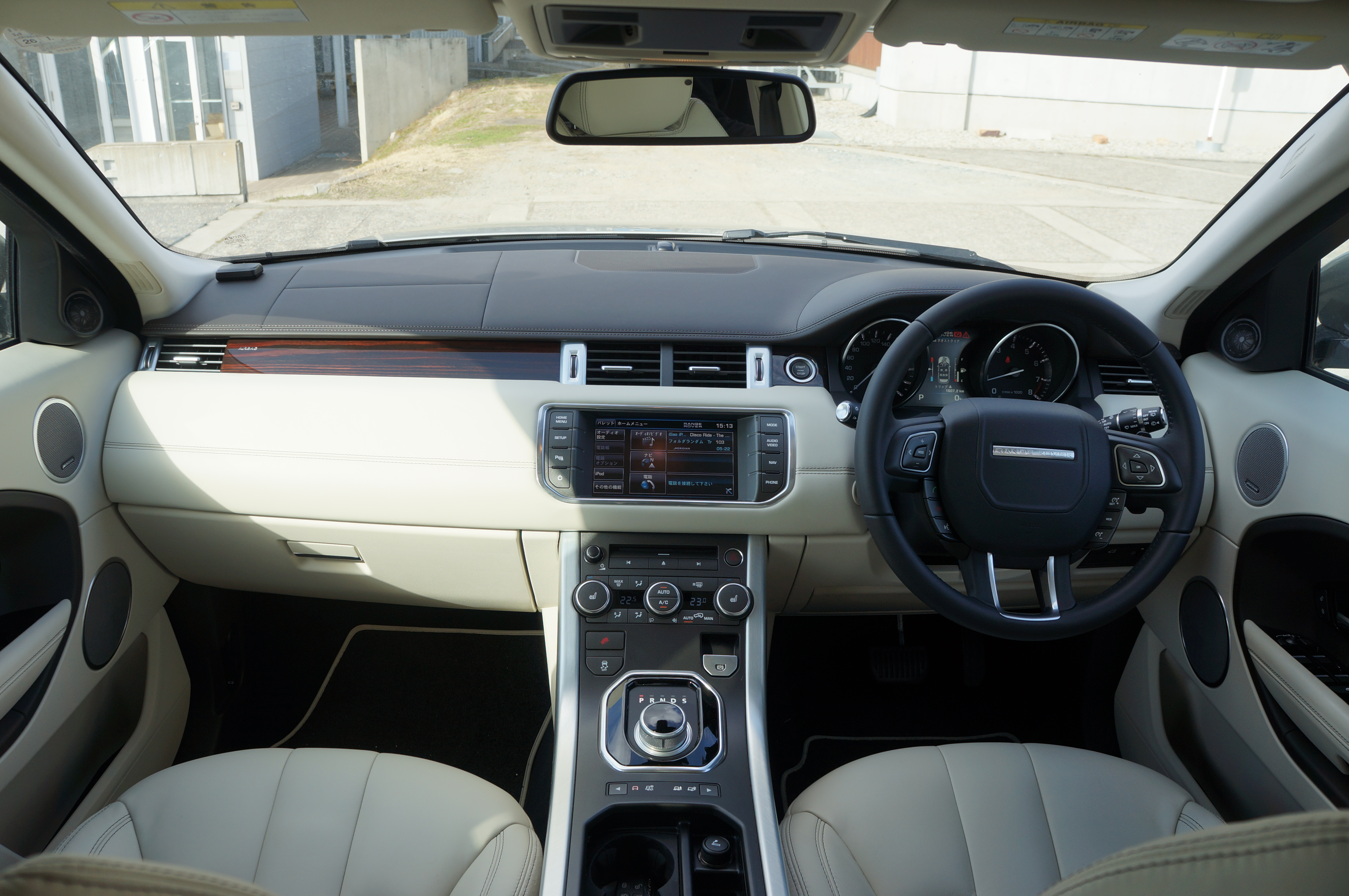 Range Rover Evoque Japan